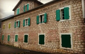 Karadağ'ın Kotor kentinde tarihi bir yapı.